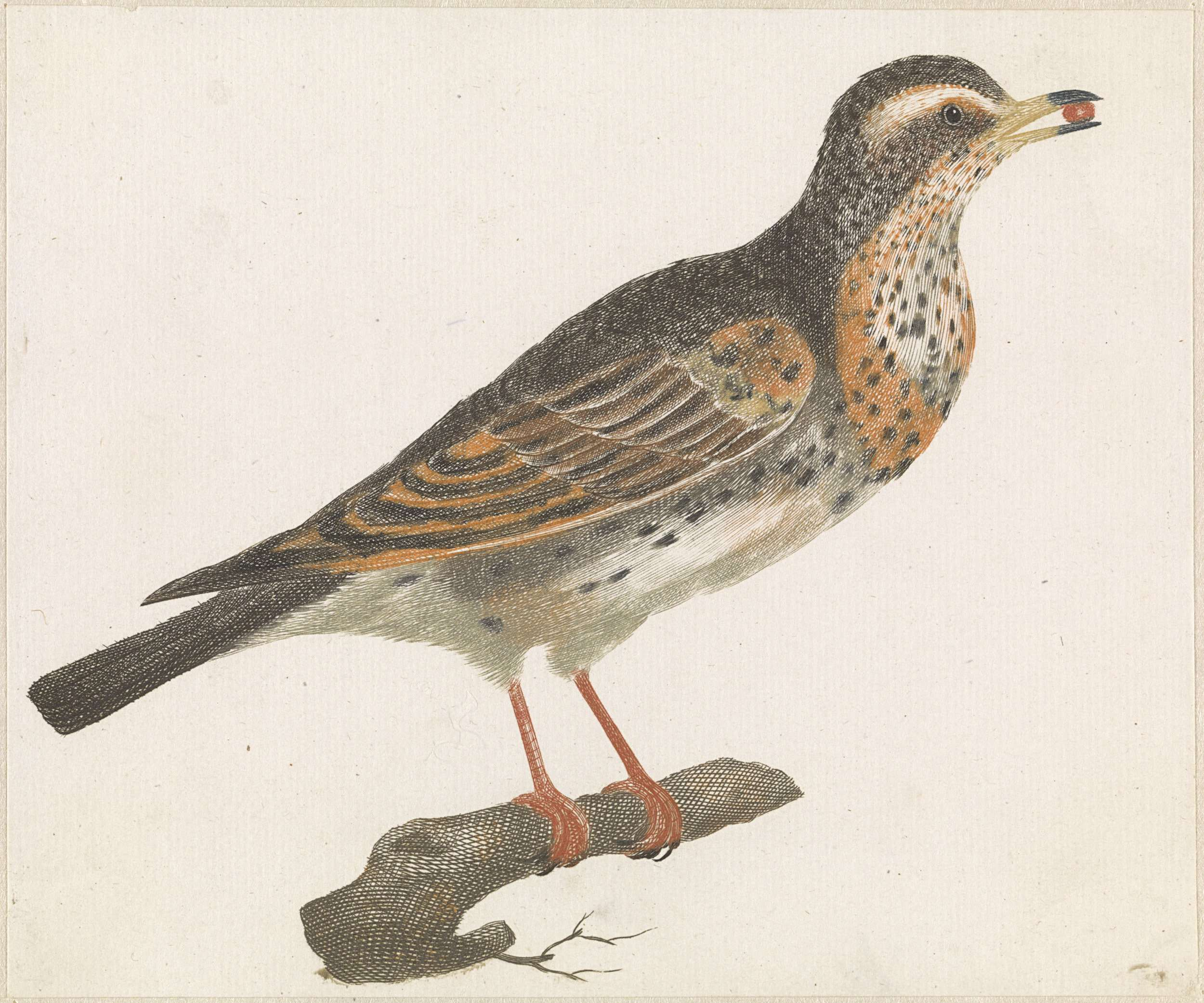 Iconclasscode 25F32(THRUSH); print